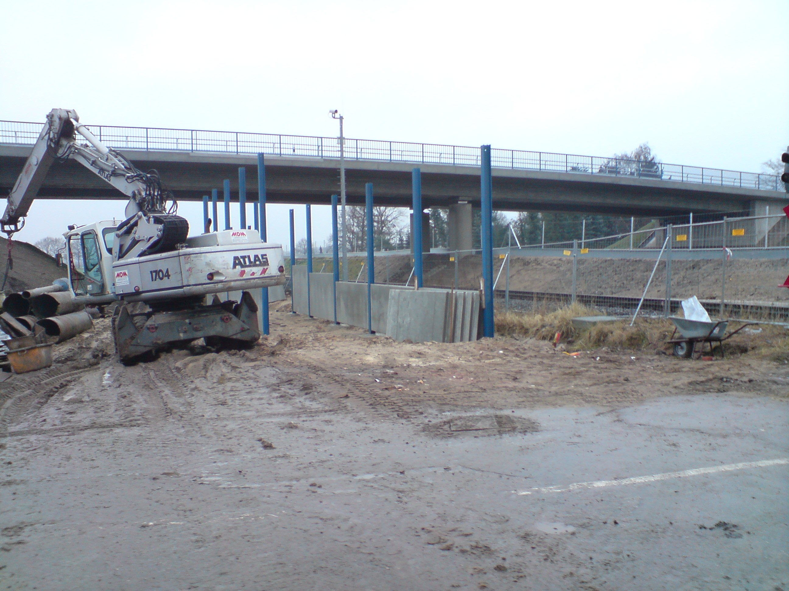 Bauarbeiten Haltepunkt Lübeck-Blankensee